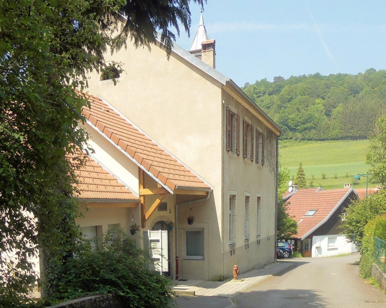 La mairie de Liebvillers